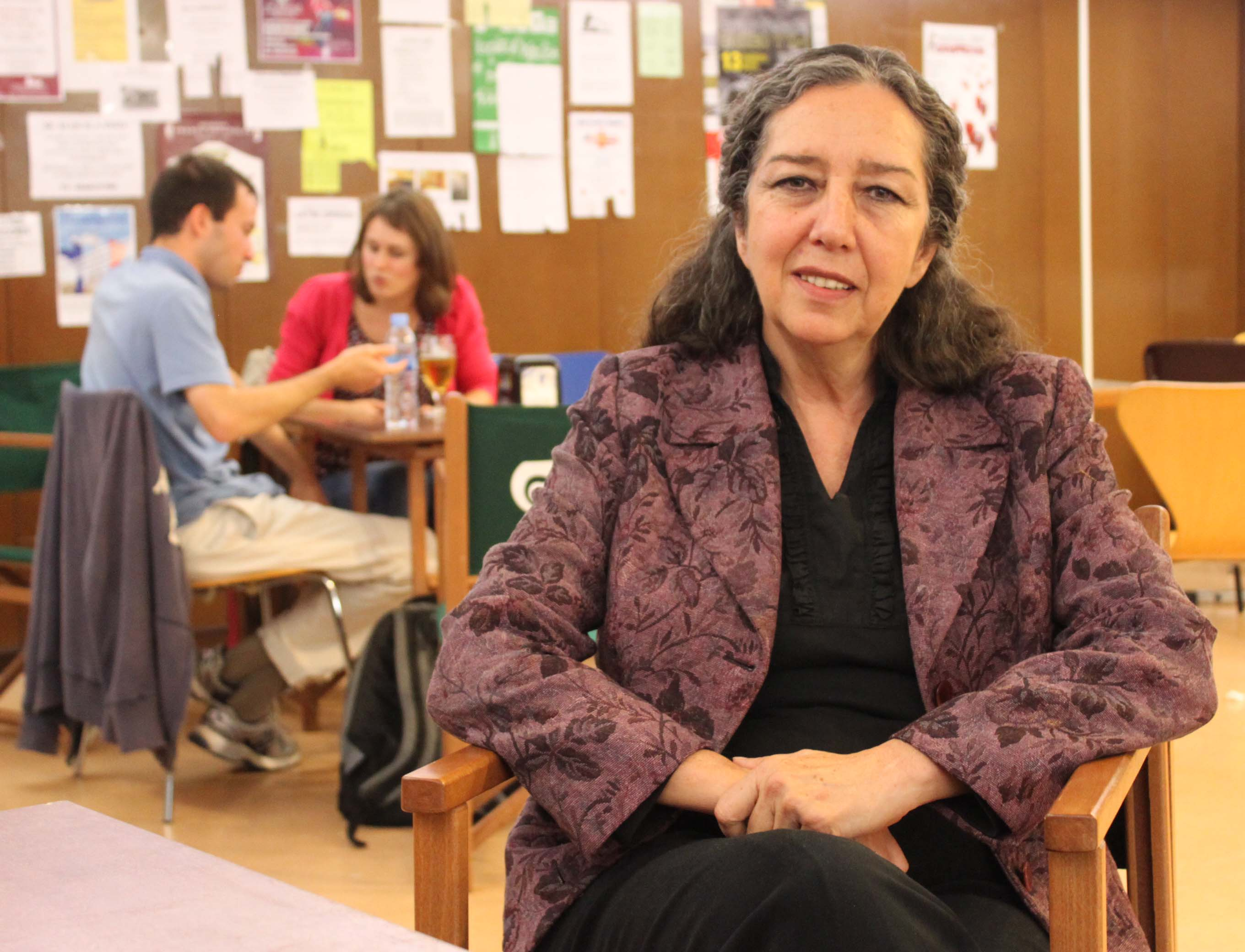 Marcela Lagarde, en la cafetería del Edificio Quintiliano de la Universidad de La Rioja.